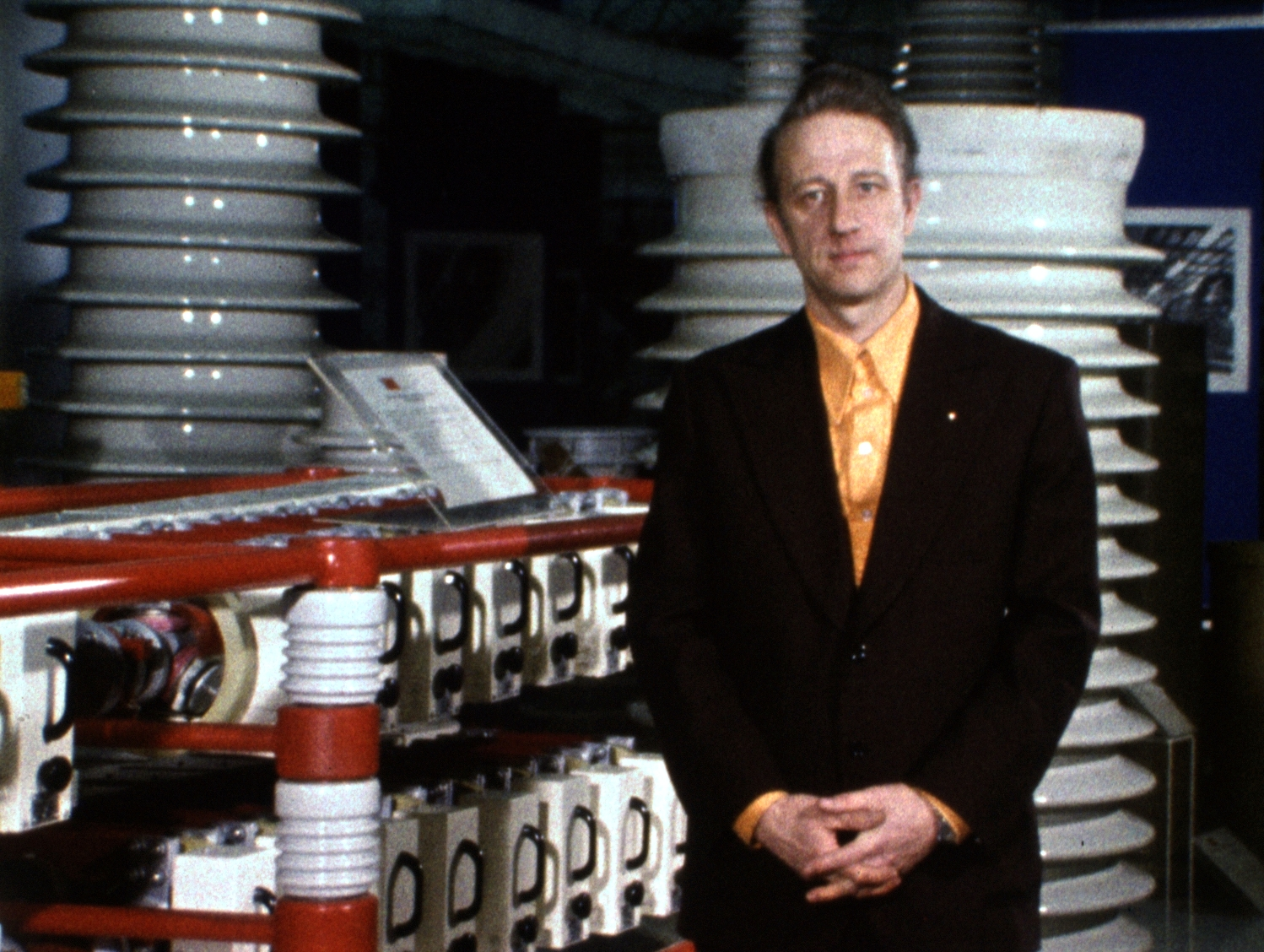 Н. Н. Богданов на выставке силовой промышленной электроники